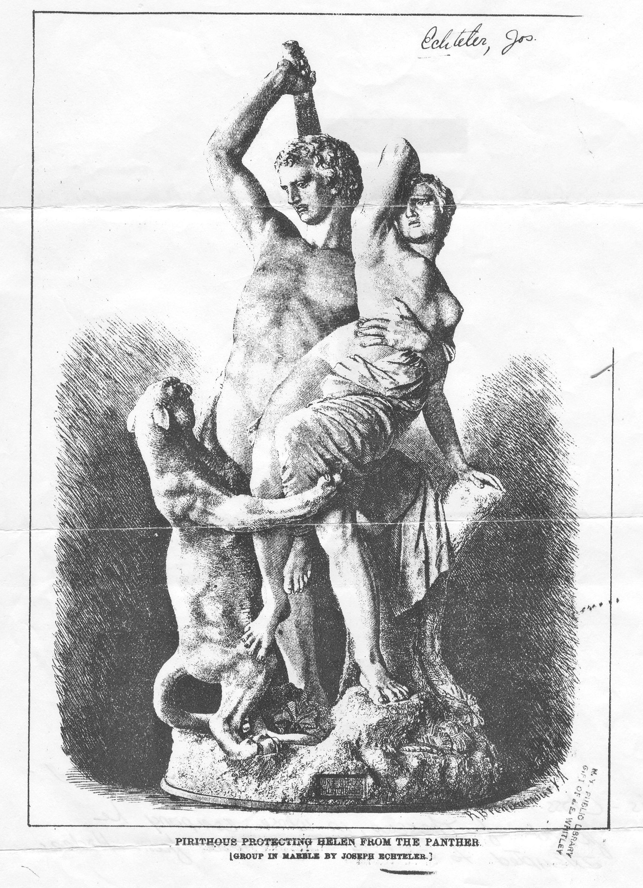 Kollosal-Skulptur "Pirithous' Kampf um Helena" von Joseph Echteler (genaues Jahr unbekannt). Abbildung (Holzschnitt?) von Richard Brend’amour (genaues Jahr unbekannt).